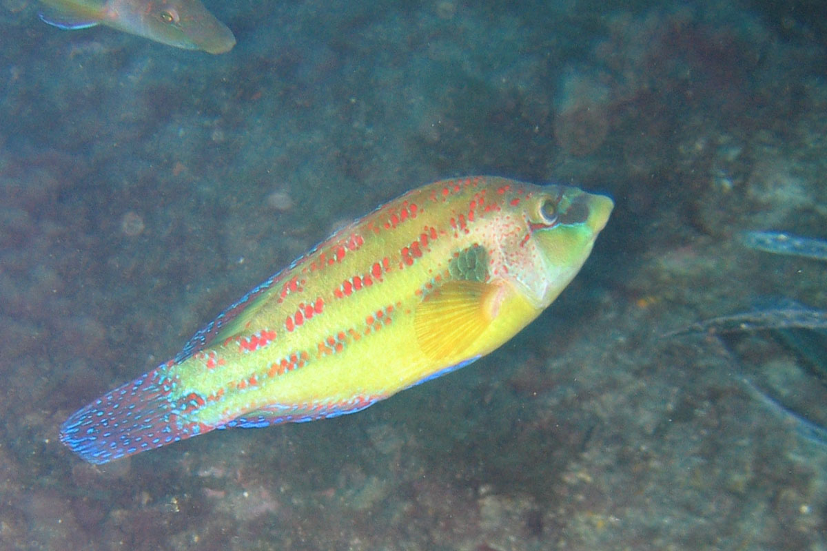 Crénilabre paon à Port-Cros (Var - France)